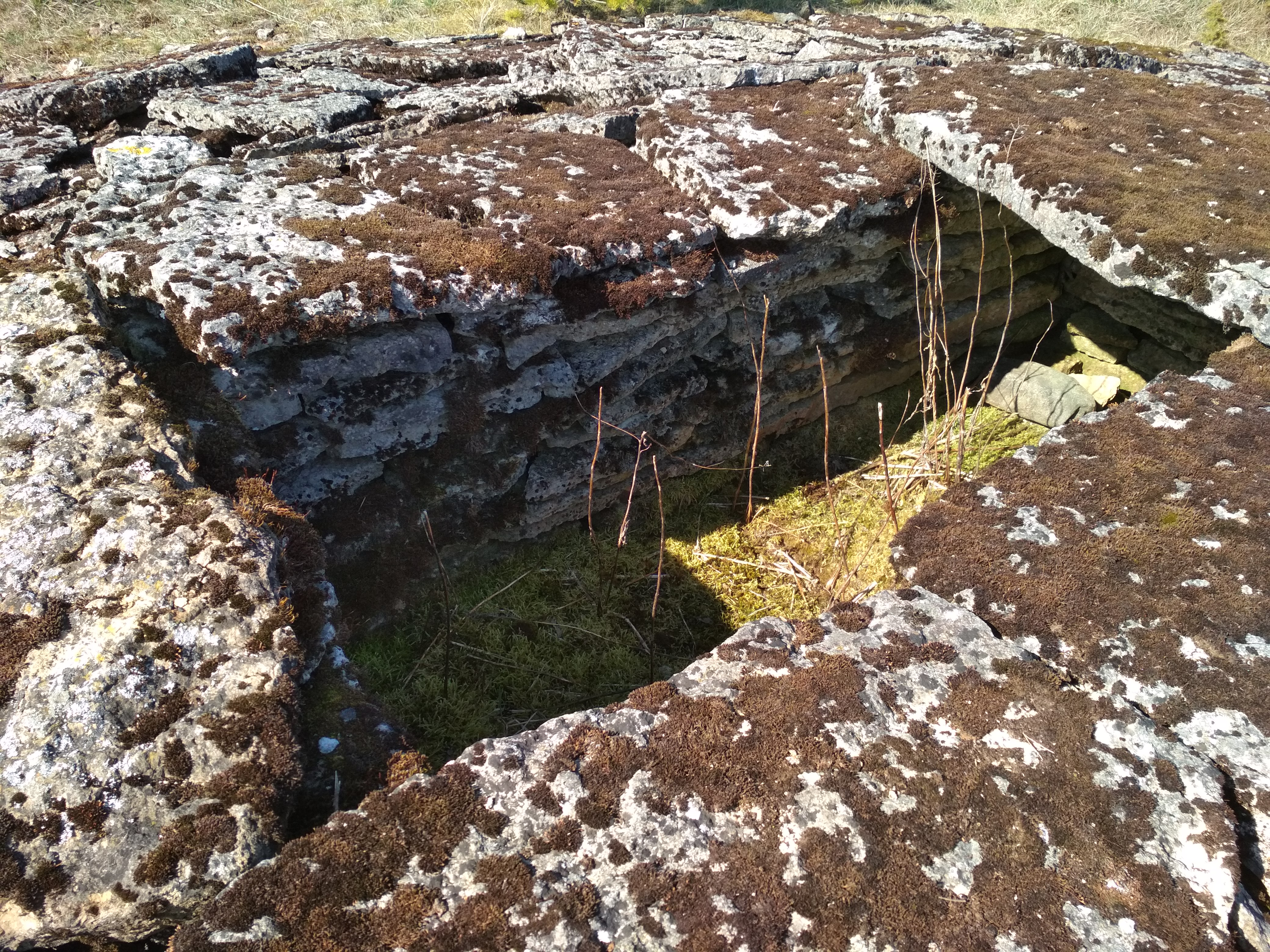 Ühe kivikalme kirst Rebala küla kivikirstkalmete rühmast nimega "Lastekangrud"